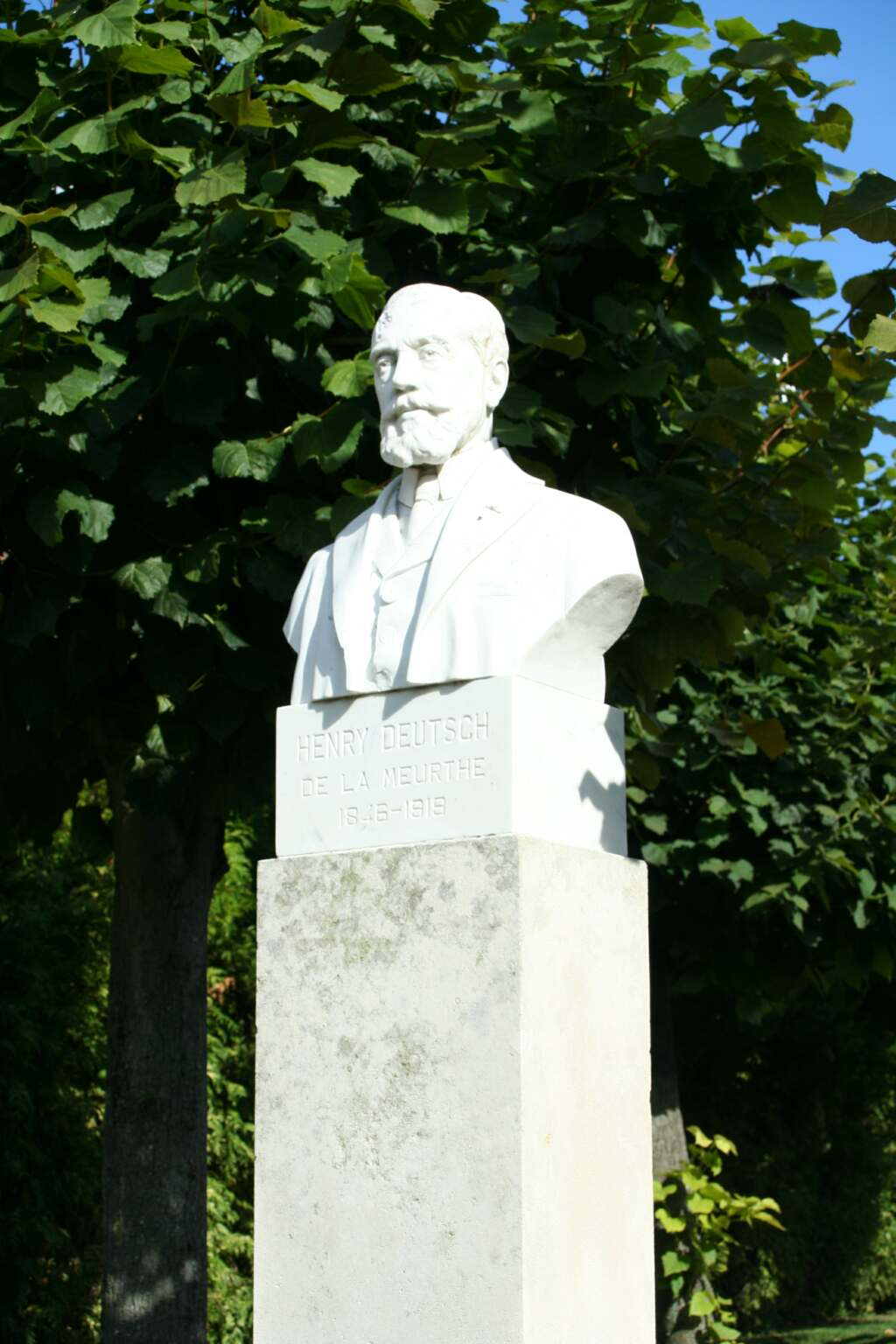 Buste d'Henry Deutsch de la Meurthe à Ecquevilly - Yvelines (France)